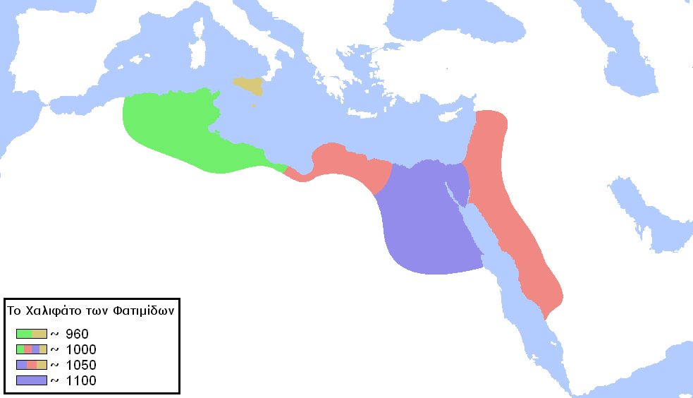 Το Χαλιφάτο των Φατιμίδων την περίοδο 960-1100 μ.Χ.